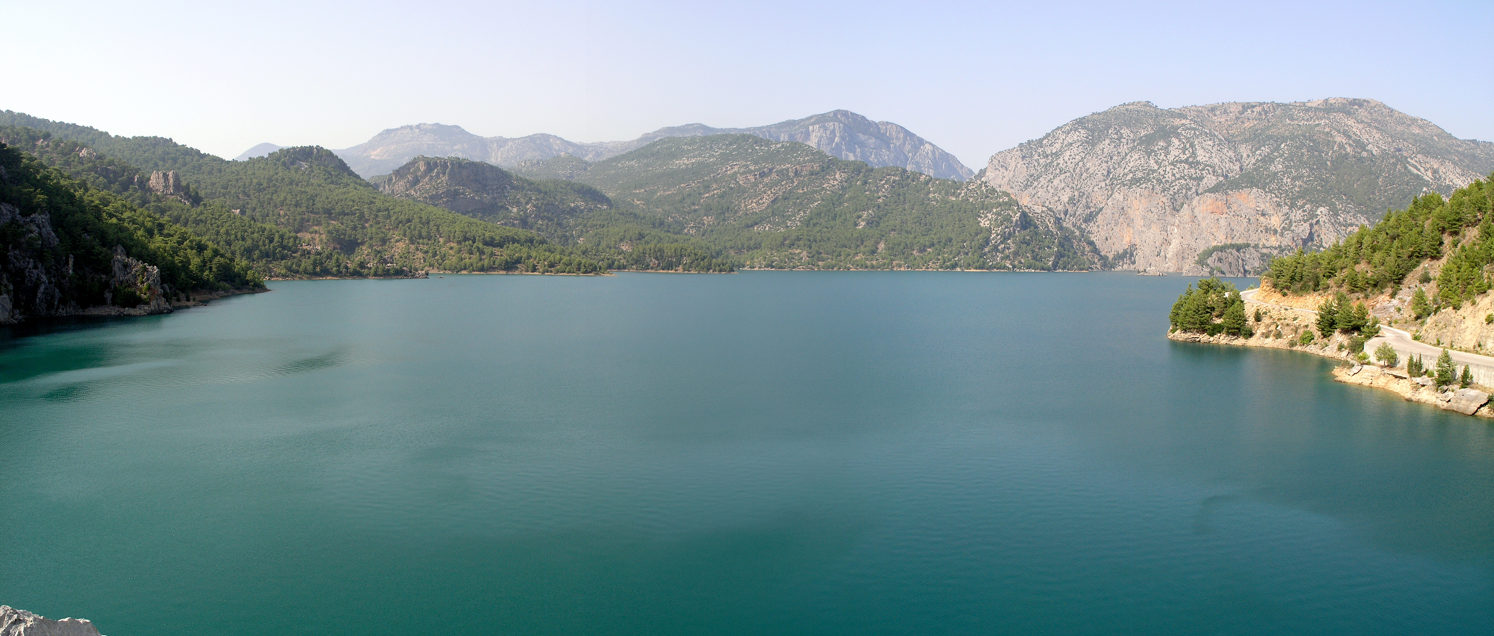 Водохранилище на реке Манавгат за плотиной Оймапинар